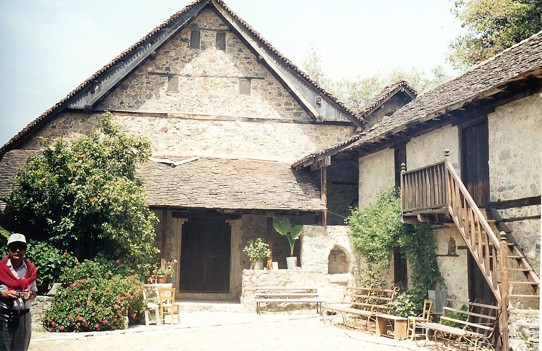 Kalopanagiotis, Agios Ioannis Lampadistis Kirche, Troodos, Zypern (UNESCO Weltkulturerbe)